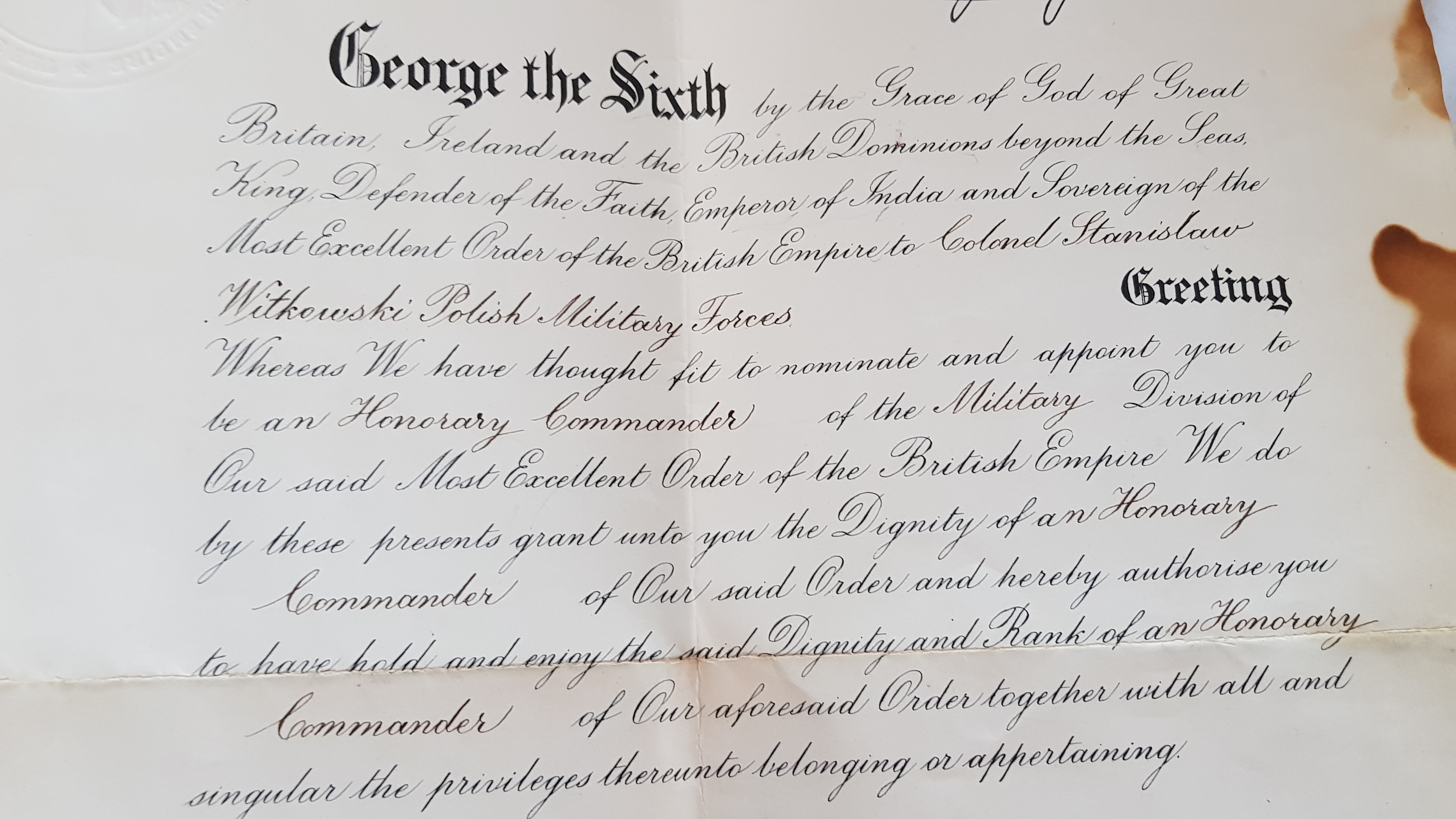 dokument nadania orderu Commander of the British Empire pułkownikowi Stanisławowi Witkowskiemu